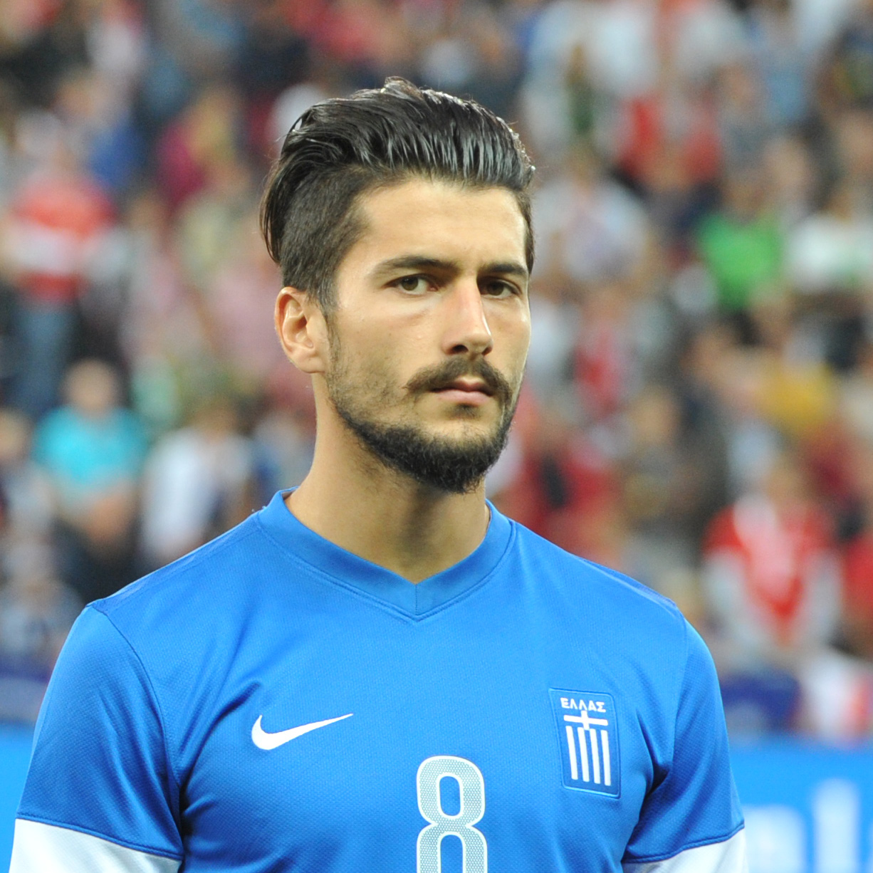 Freundschaftliches Länderspiel Österreich - Griechenland am 14. August 2013 in Salzburg: Panagiotis Kone